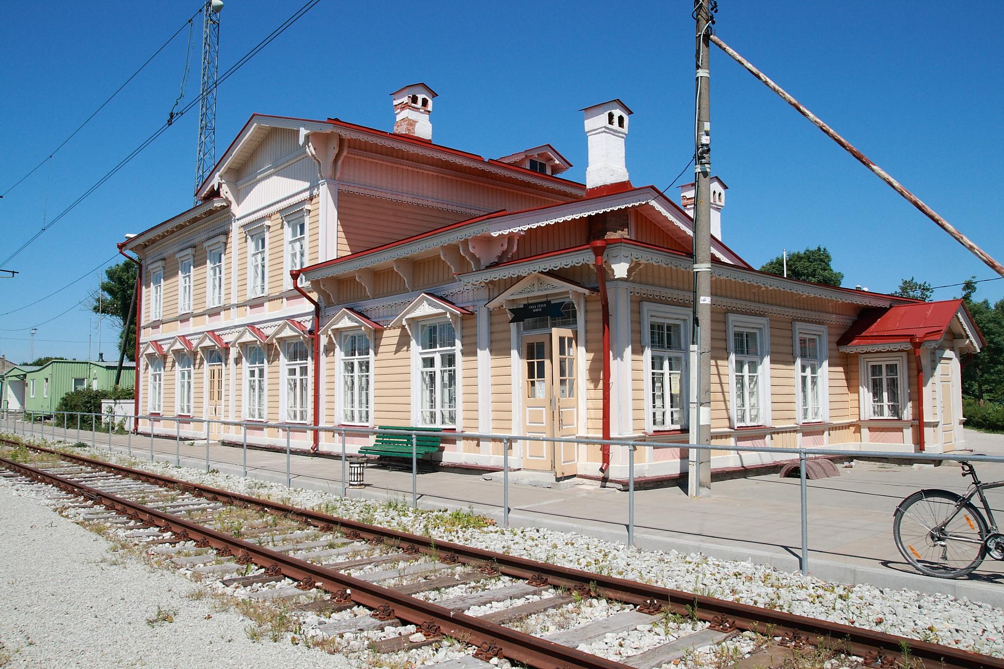 Paldiski jaamahoone, suvi 2011.